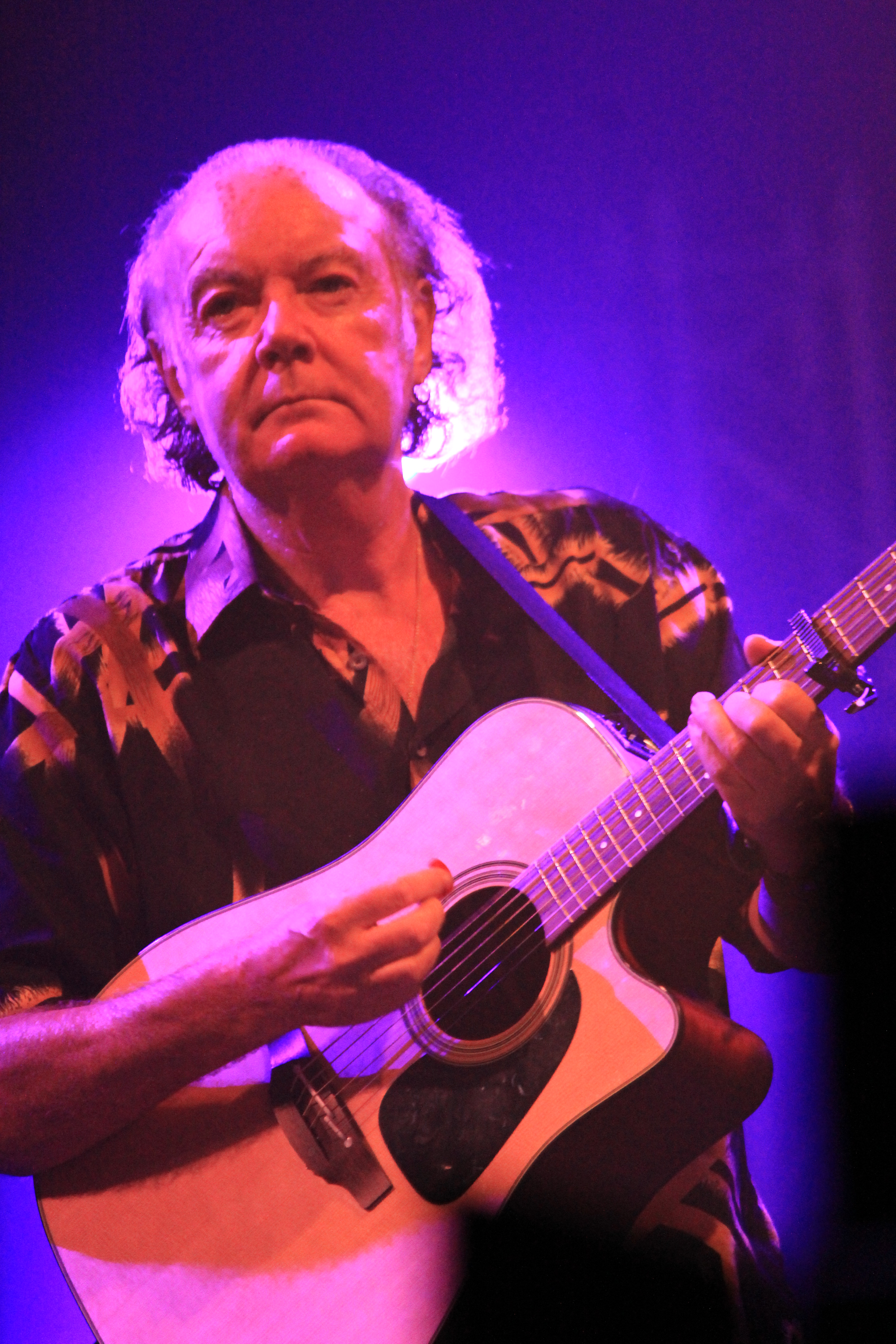 Noel Ó Dúgáin pendant le concert de Clannad lors du festival interceltique de Lorient 2013